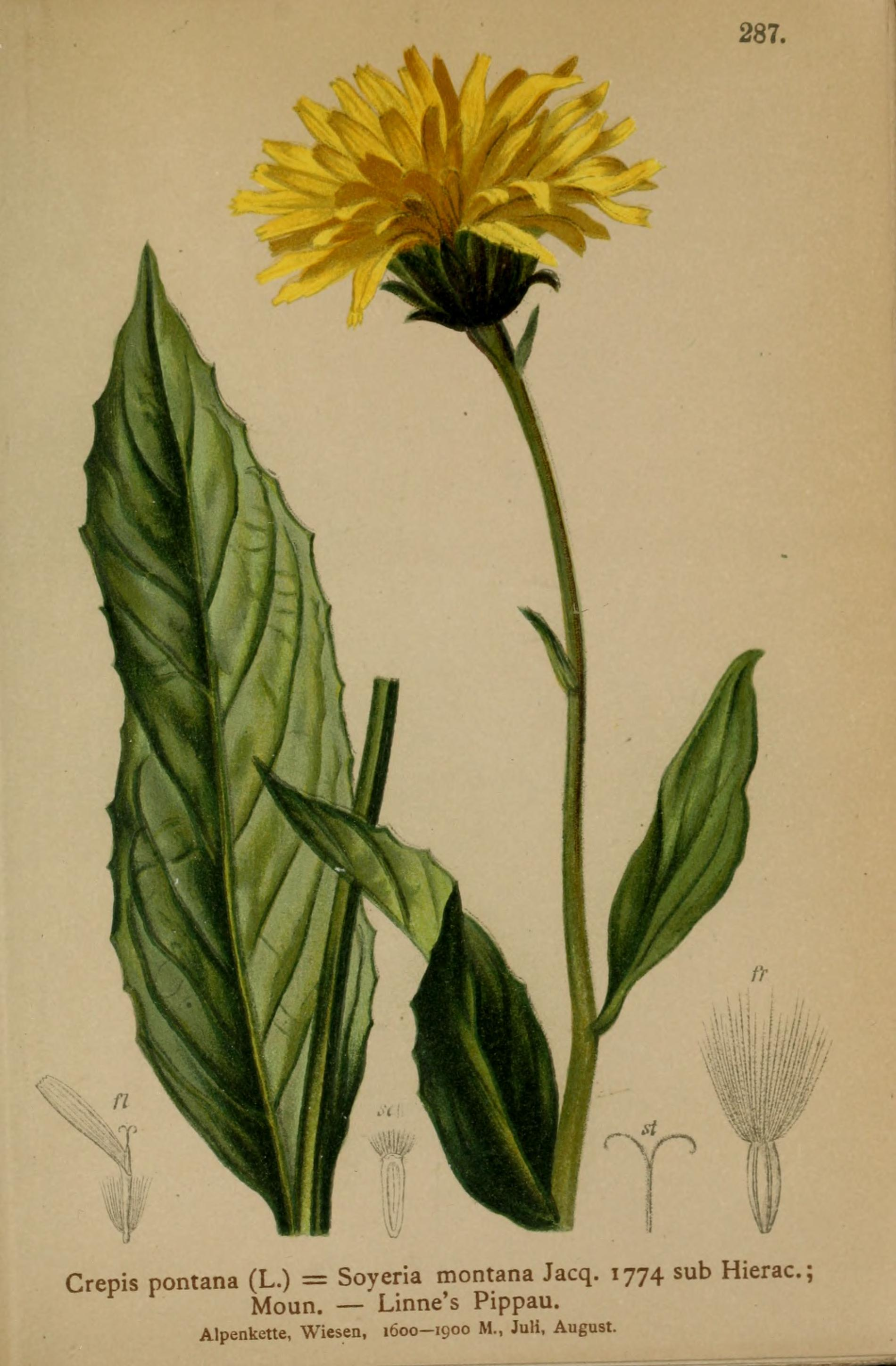 Atlas der Alpenflora / herausgegeben vom Deutschen und Oesterreichischen Alpenverein ; nach der Natur gemalt von Anton Hartinger ; mit Text von K.W. v. Dalla Torre.